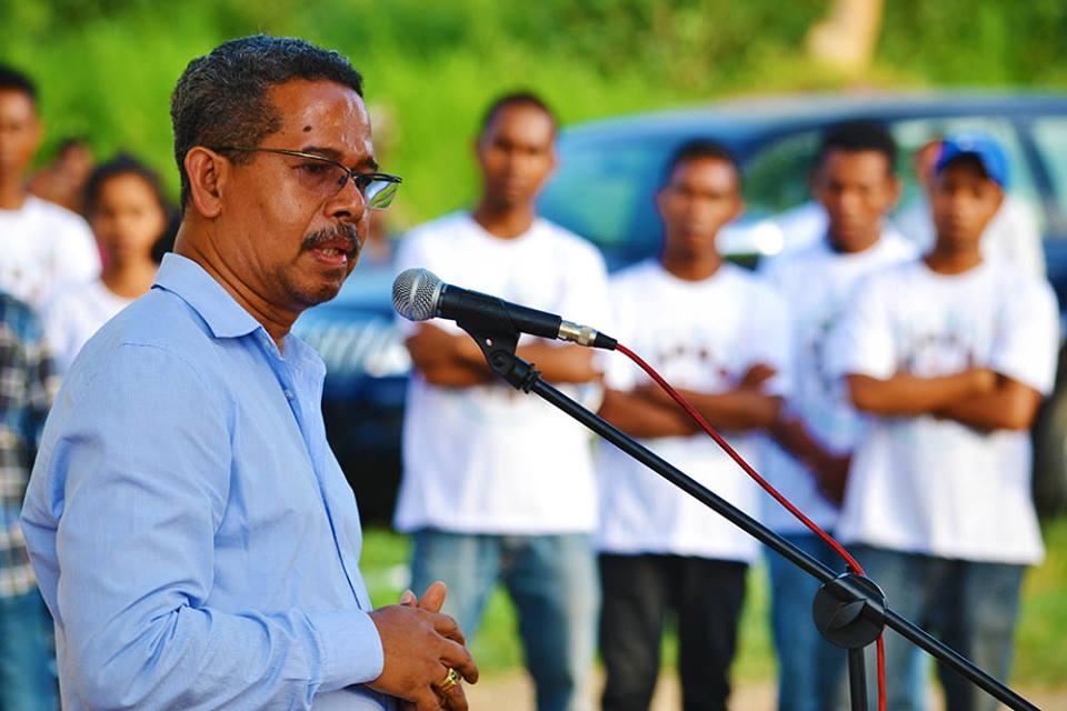 Miguel Manetelu em Jardim dos Heróis e Martires da Pátria em Metinaro